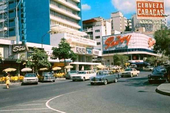 Avenida Abraham Lincoln en Caracas Venezuela (años cincuenta)